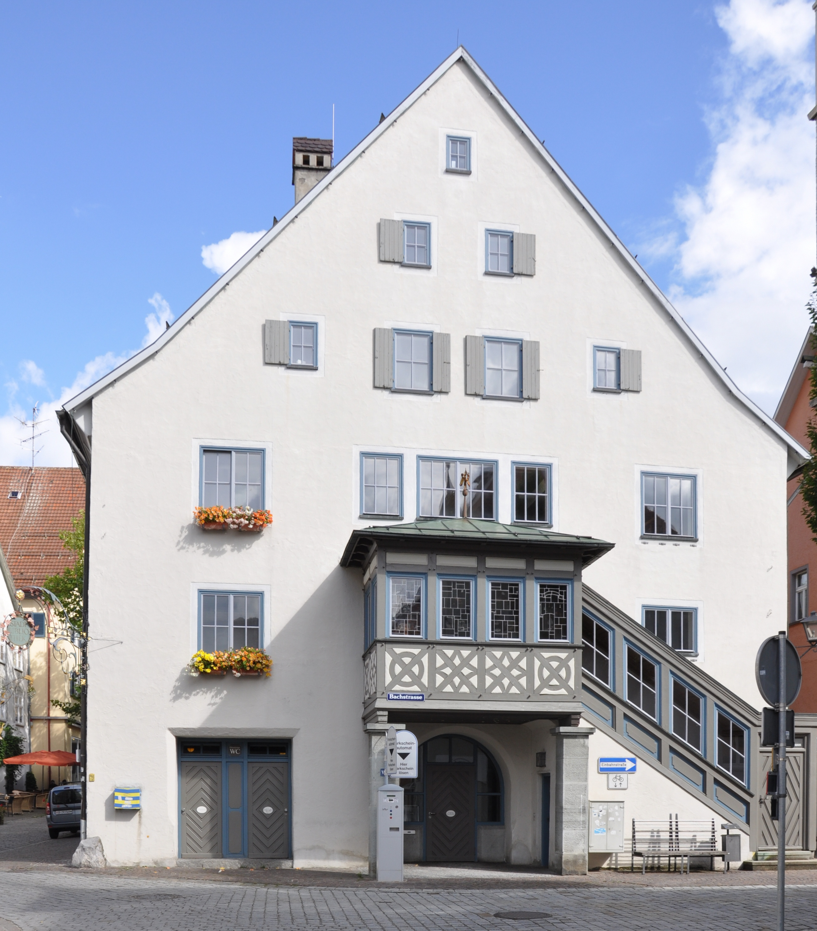 Leutkirch im Allgäu, Kornhaus, heute Stadtbibliothek